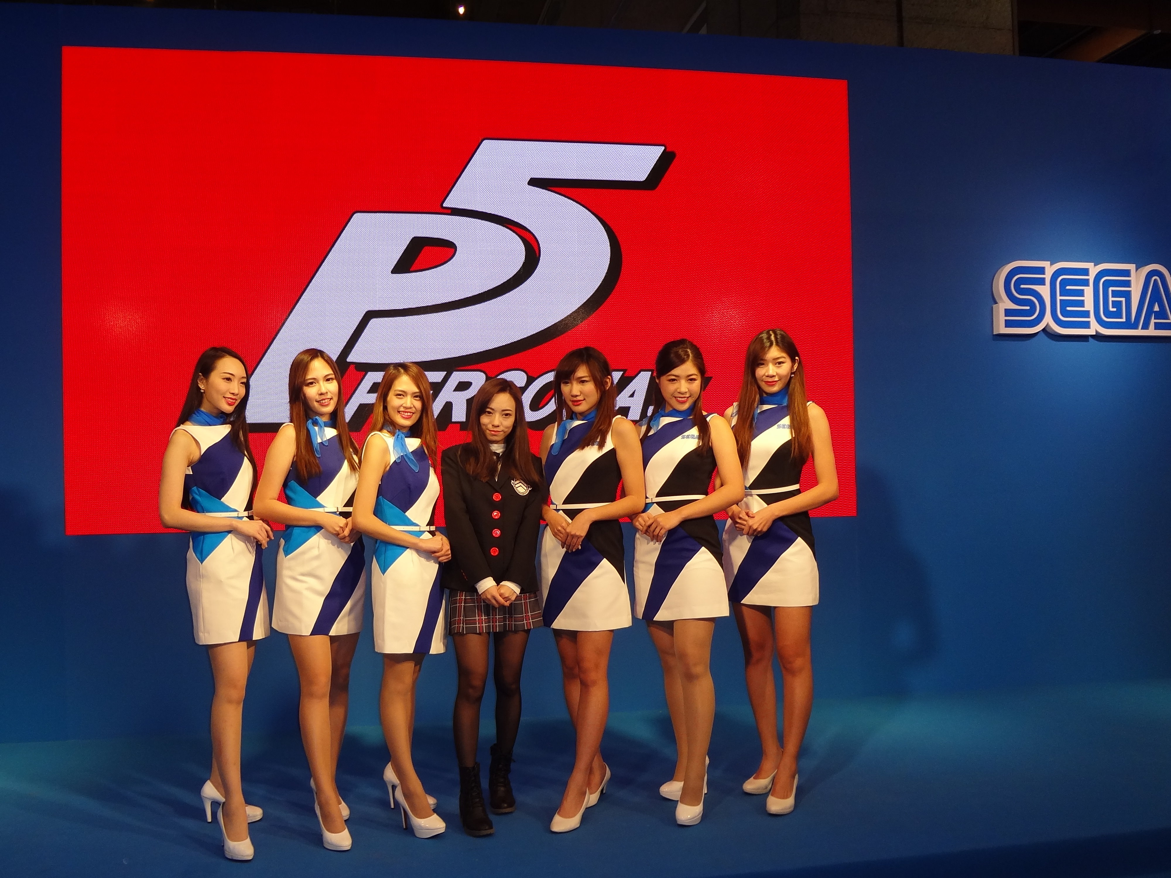 2017臺北國際電玩展，世嘉攤位的宣傳模特兒與《女神異聞錄5》標題。